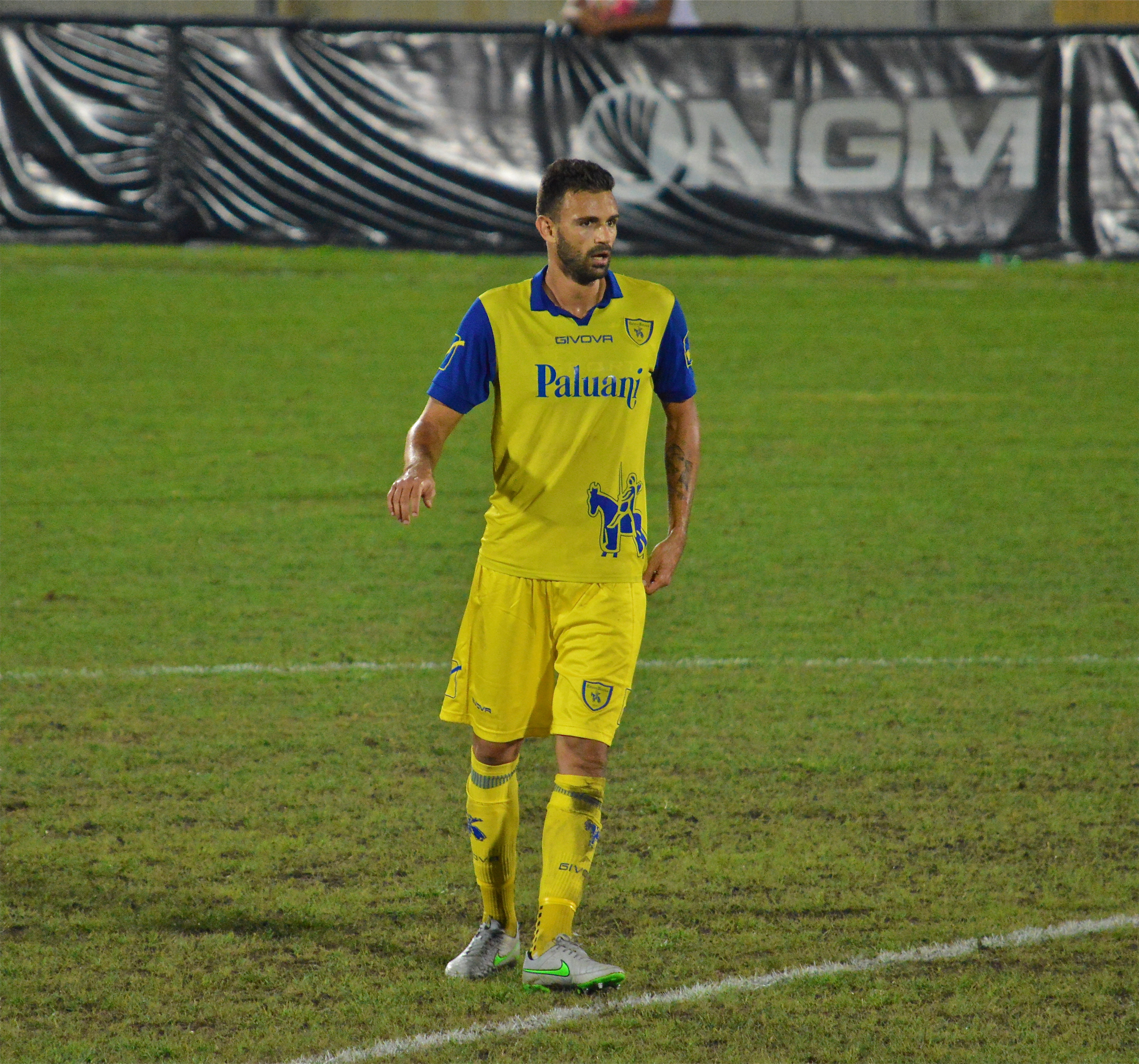 Ivan Radovanovic, in forza al Chievo